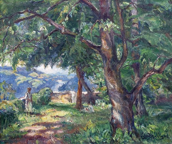 Zwei Frauen auf einem Ausblick in waldiger Landschaft